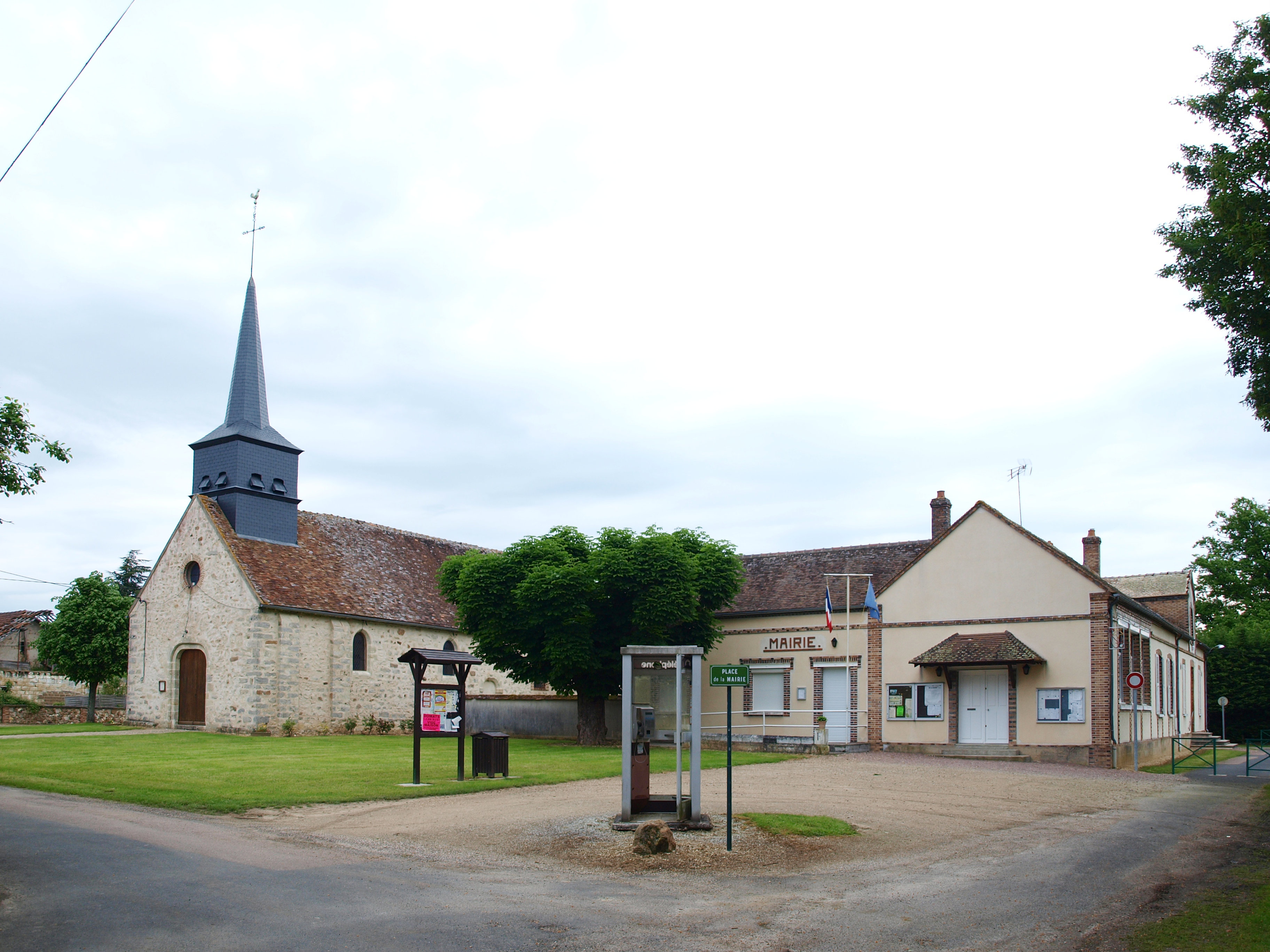 La Belliole (Yonne, France)